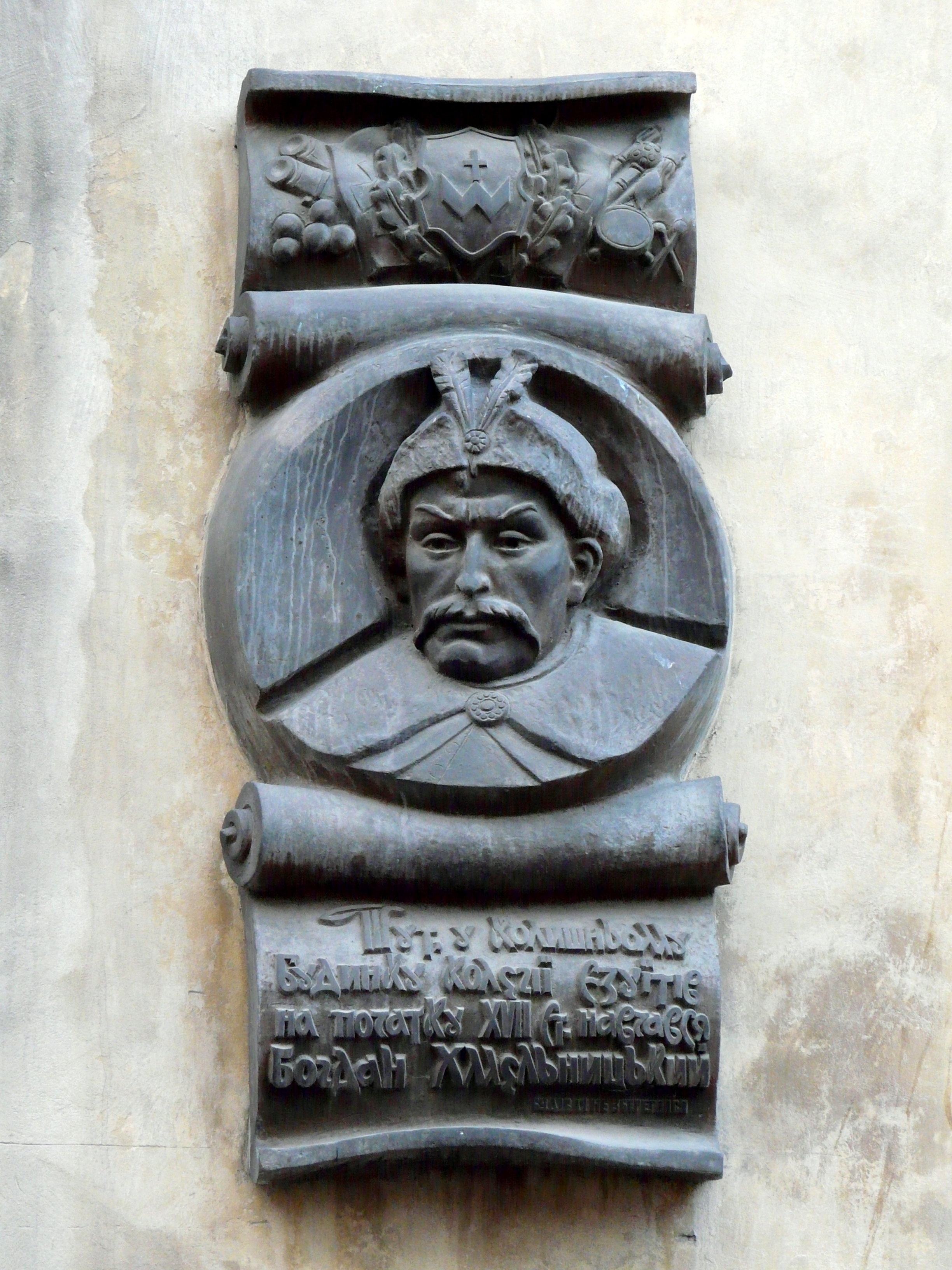 адміністративний будинок (Колегія Єзуїтів), Львів, Театральна, 13